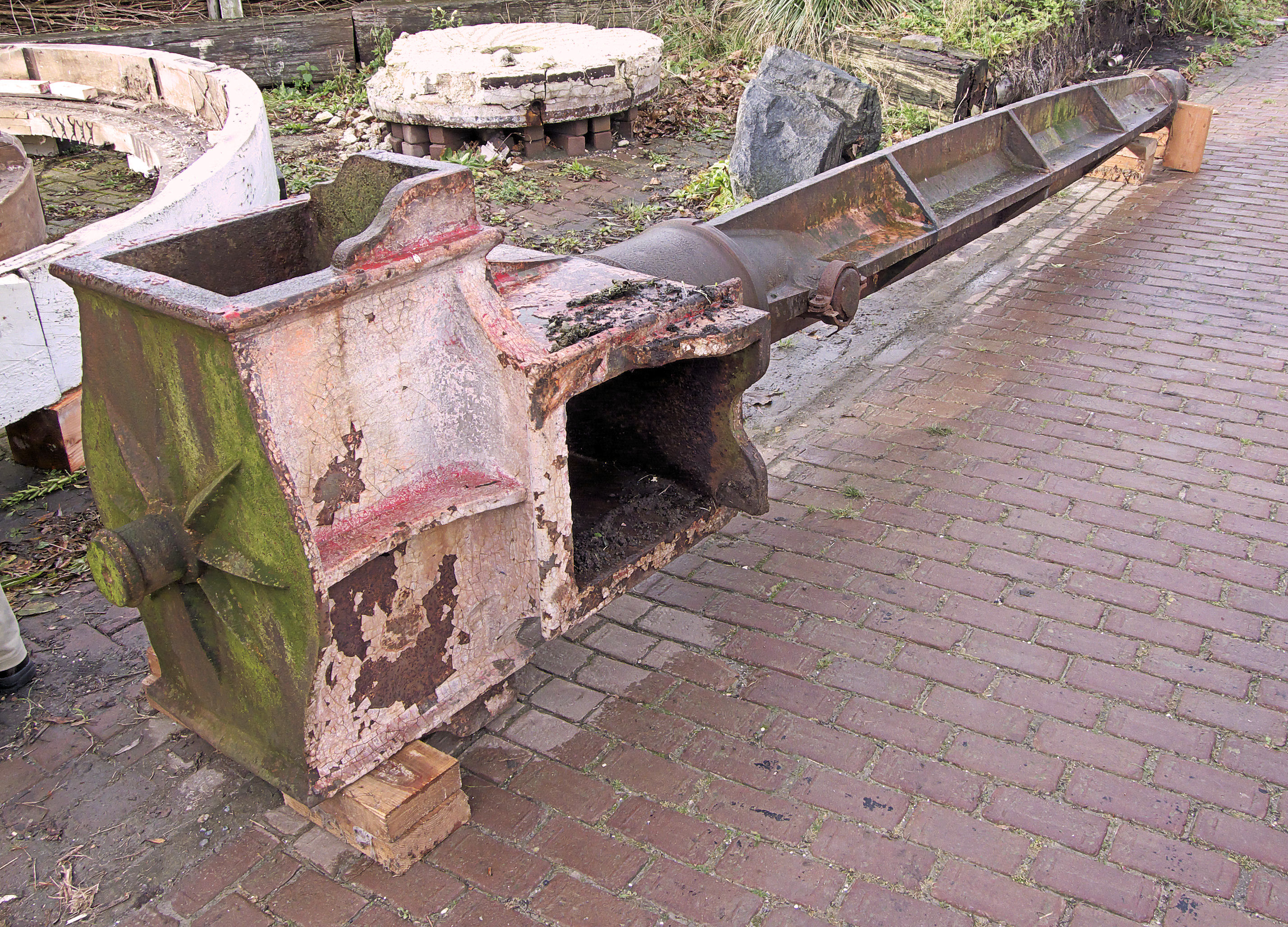 Bovenas uit 1872 met nummer 326